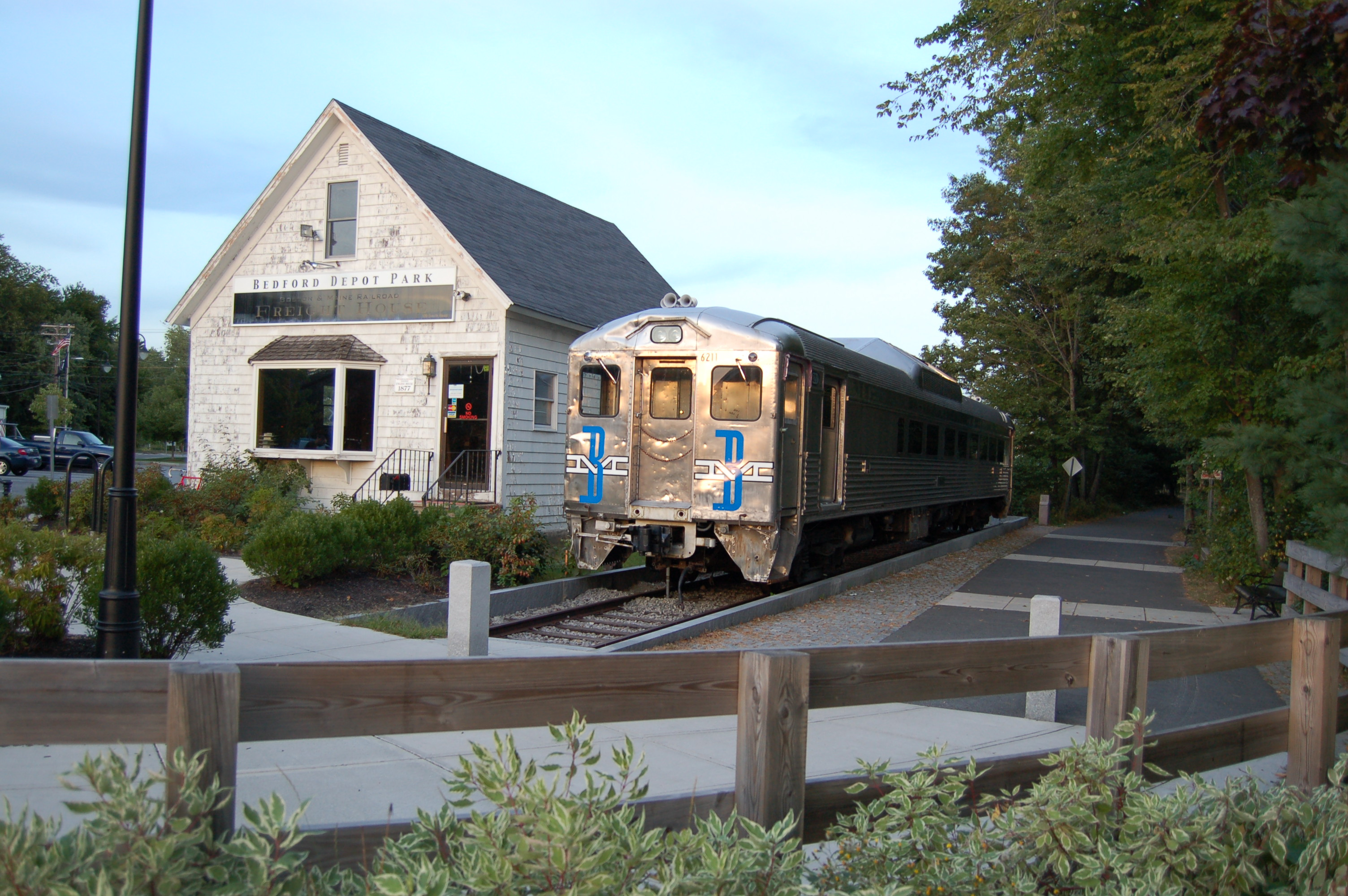 Bedford Depot Park in Bedford, Massachusetts